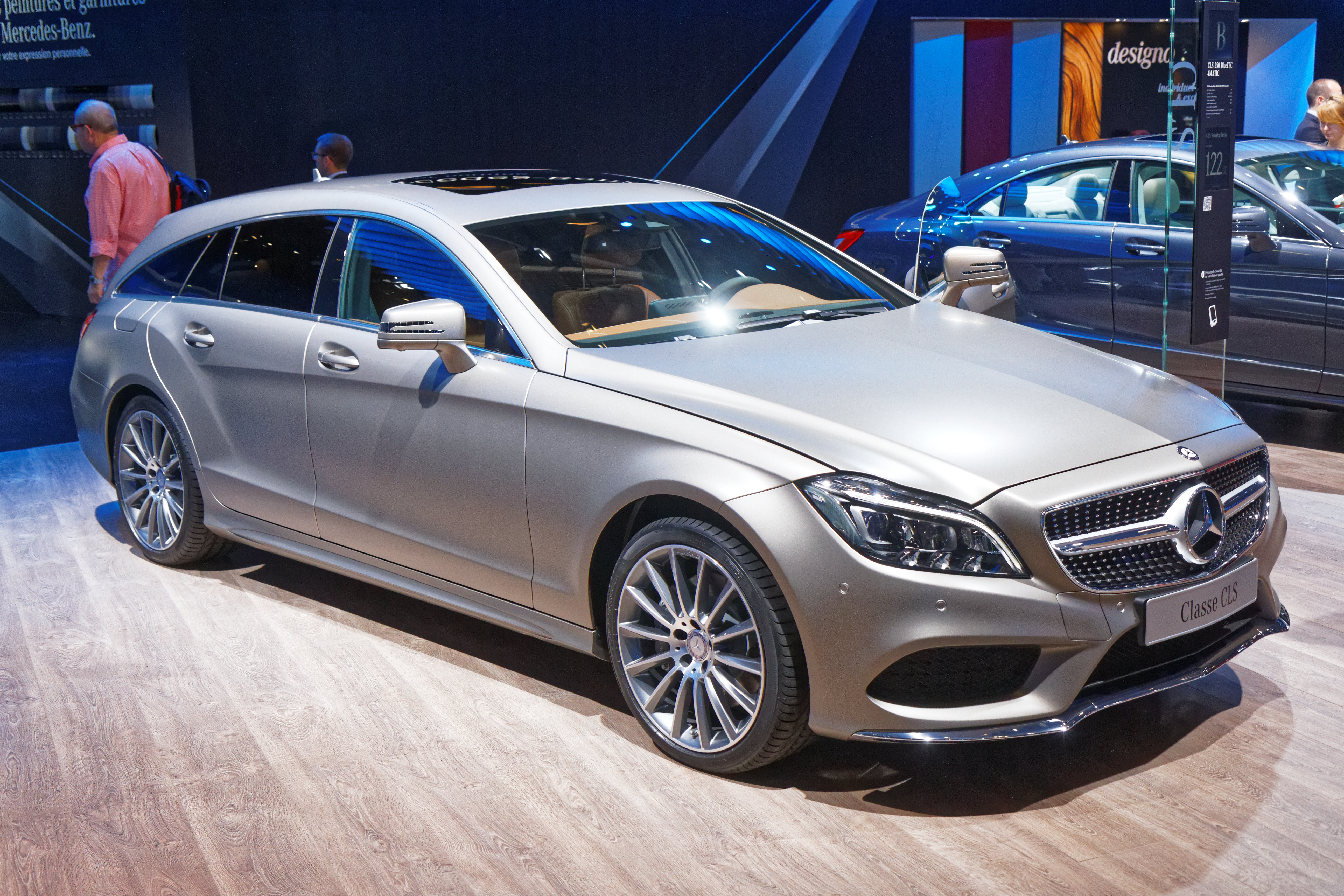 Une Mercedes CLS 350 BlueTEC 4matic présentée lors du mondial de l'automobile de Paris 2014.